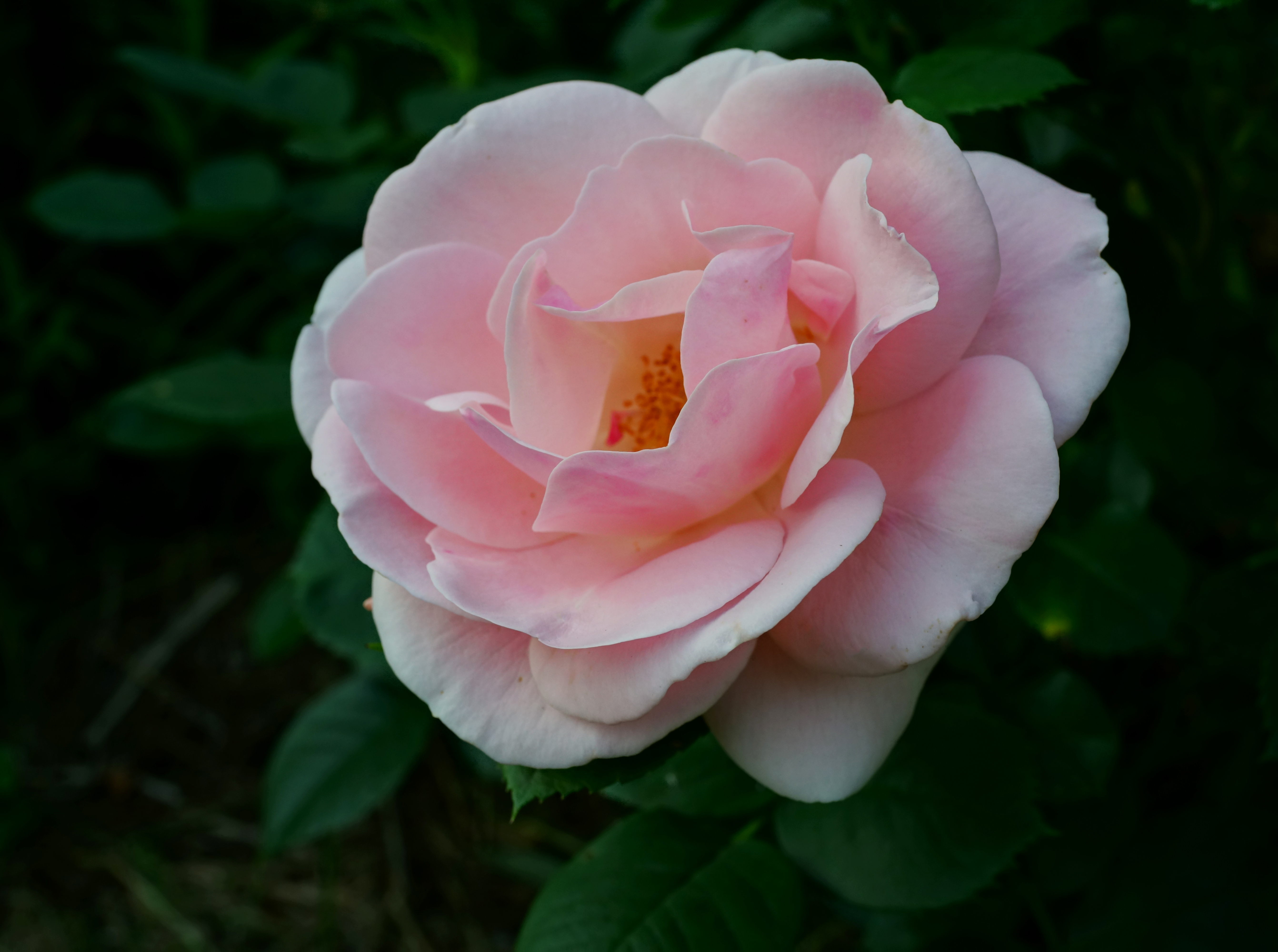 Россия, Владимирская область, частный сад